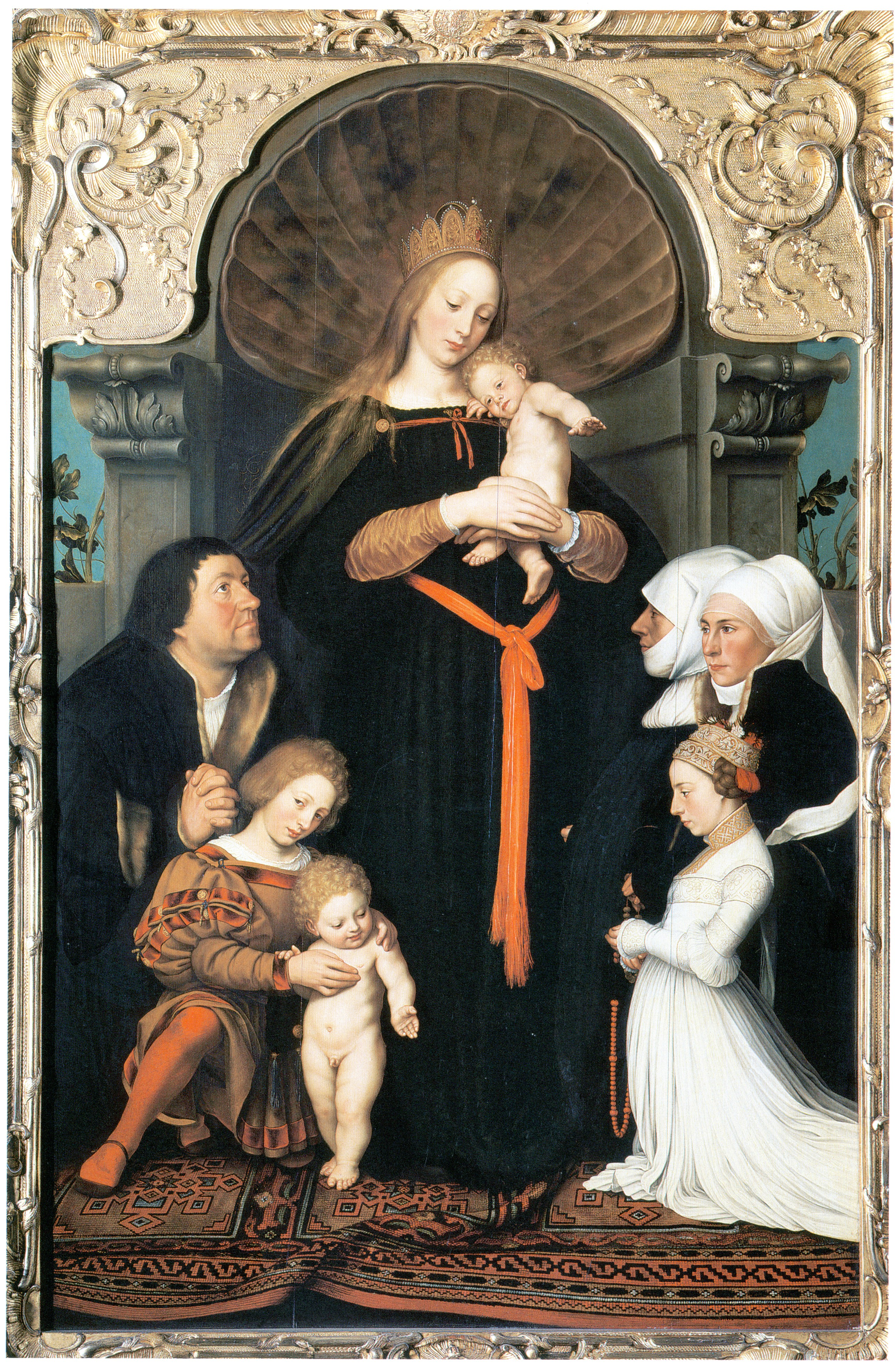 Madonna des Bürgermeisters Meyer (Darmstädter Madonna)